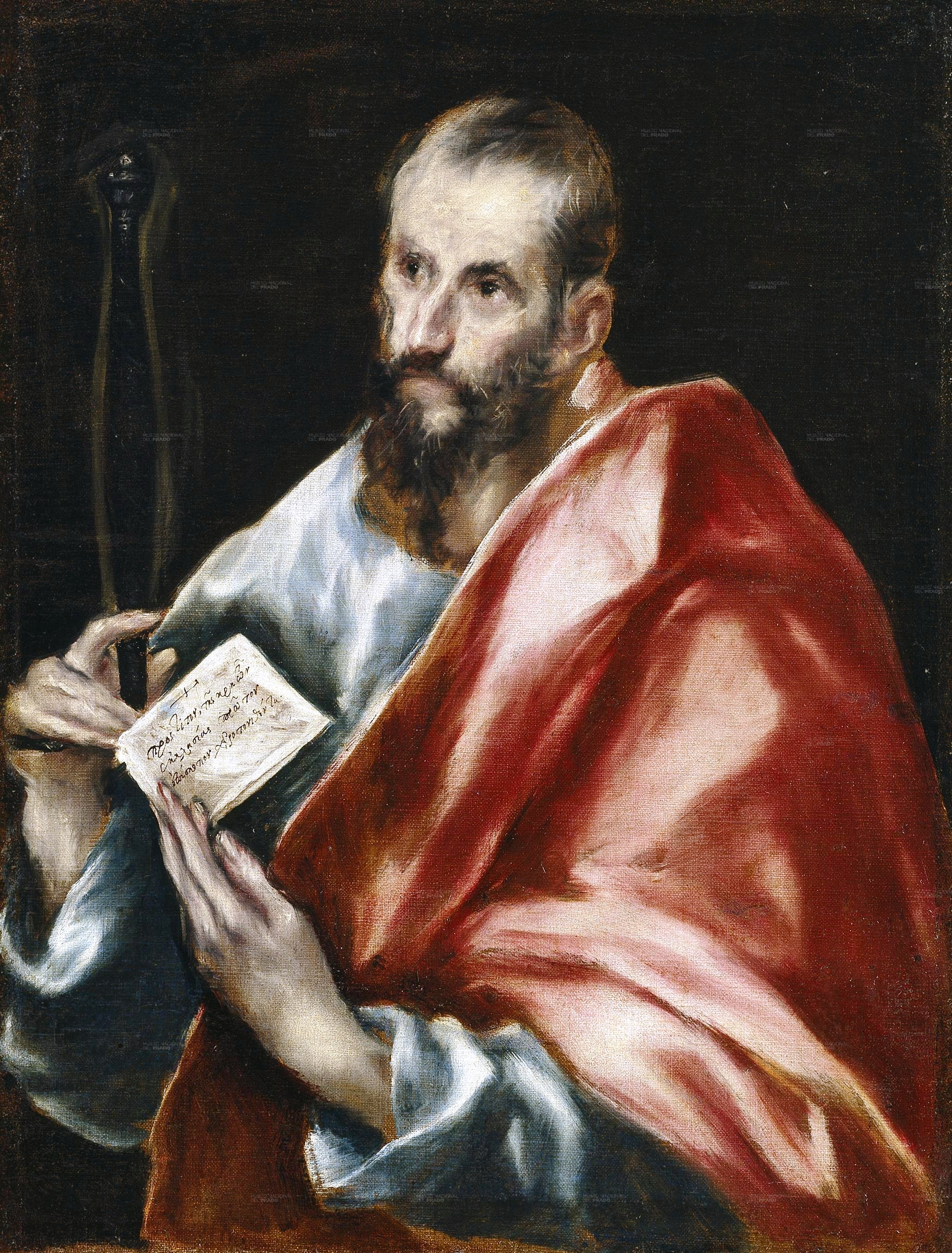 La obra representa al apóstol San Pablo, llamado el Apóstol de los Gentiles.